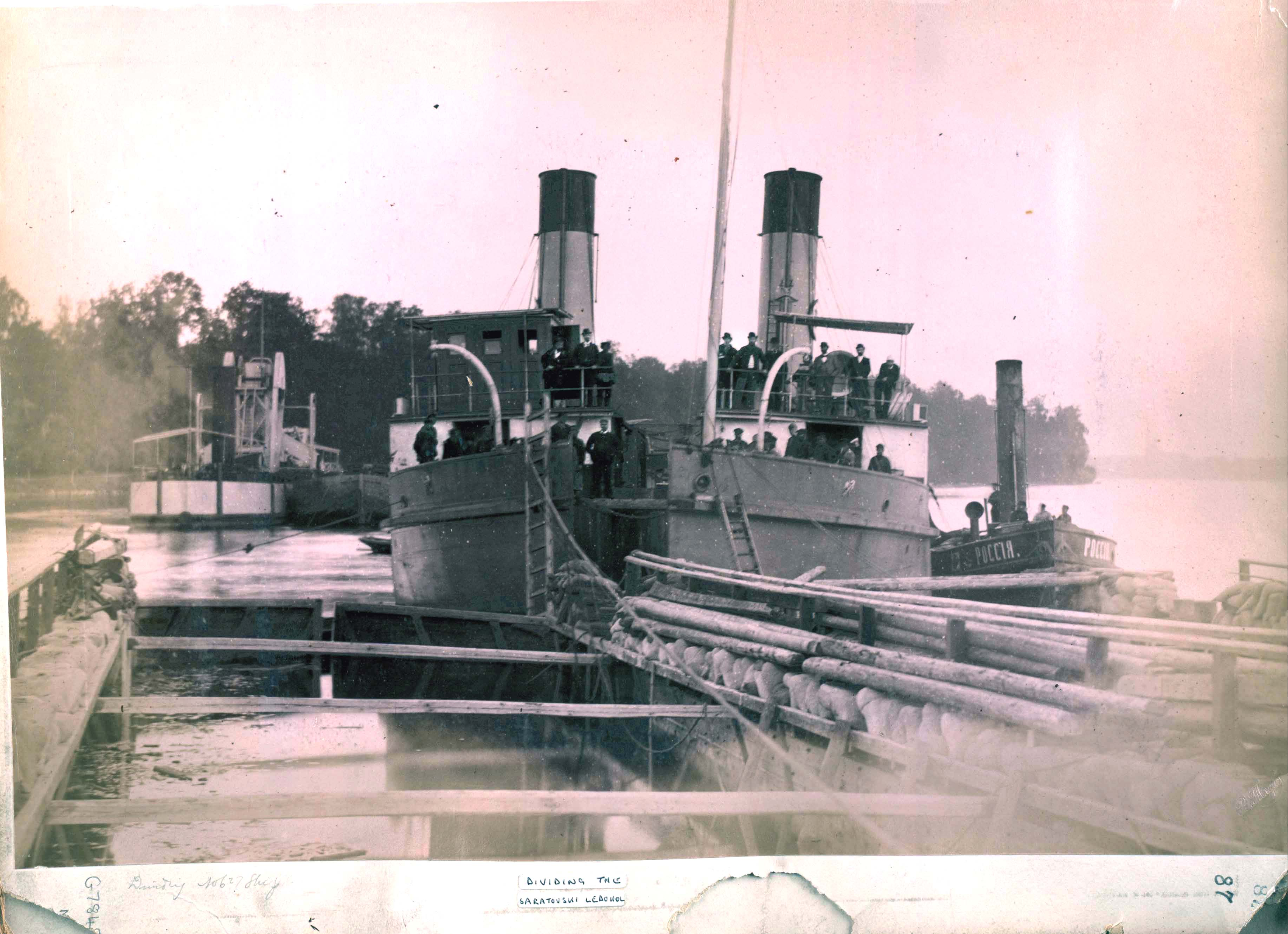 Речной ледокол Рязано-Уральской железной дороги «Саратовский ледокол» разделён на две части для прохождения Мариинского канала